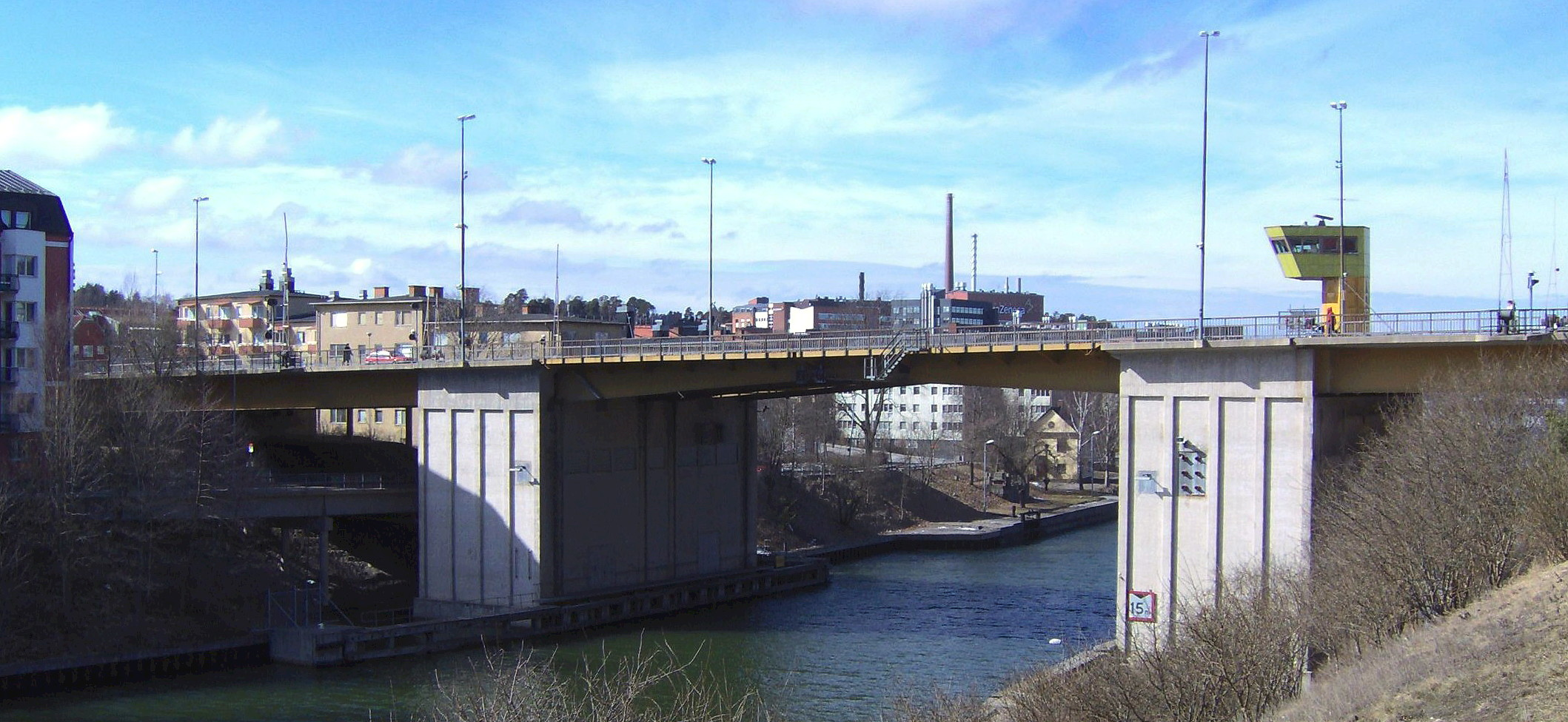 Södertälje Mälarbon på Mälarsidan några hundra meter norr om Södertälje sluss. Under broklaffarna kan man se rester av den gamls slussen och slussbyggnad. I bakgrunden syns Astra-Zeneca fabriker. Södertälje Lake Malaren Bridge, a double leaf Bascule Bridge e few hundred yards north Södertälje Lock. Beneat the leafs is the old former Södertälje Lock. In the background is part of Astra-Zeneca factories.